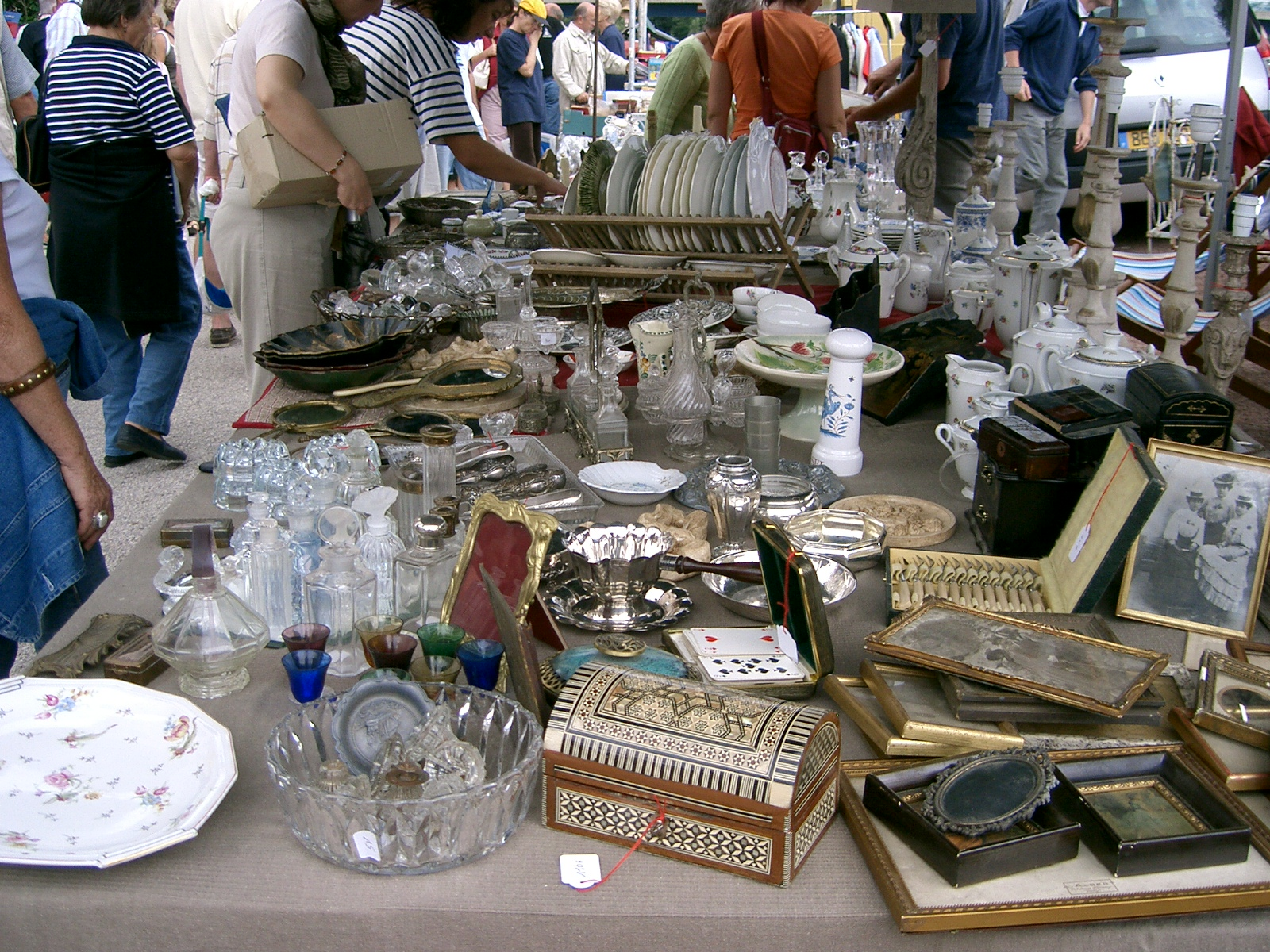 Vide grenier - brocante (France - Seurre -21) self made PRA